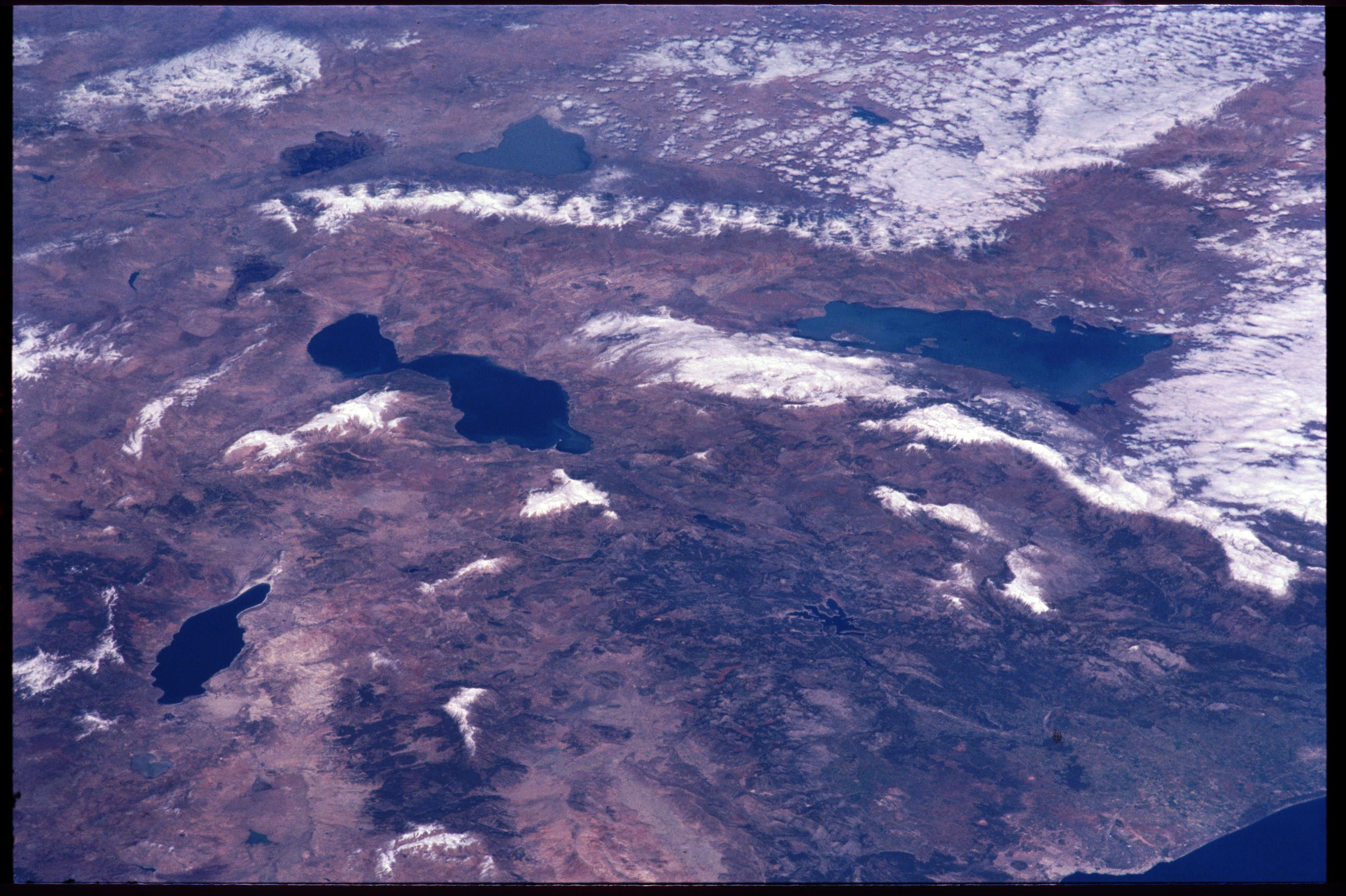 Göller yöresine Güneybatıdan bakış.